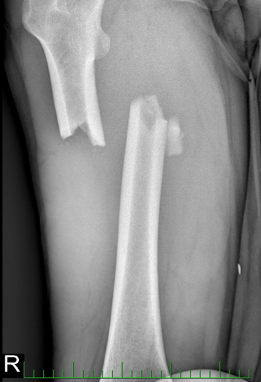 Zlomenina pravého femuru. Úraz po nehodě na kole. Náraz do stojícího automobilu v rychlosti okolo 60 km/h.